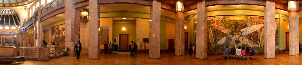 Fotografía panorámica por Raúl Bucio